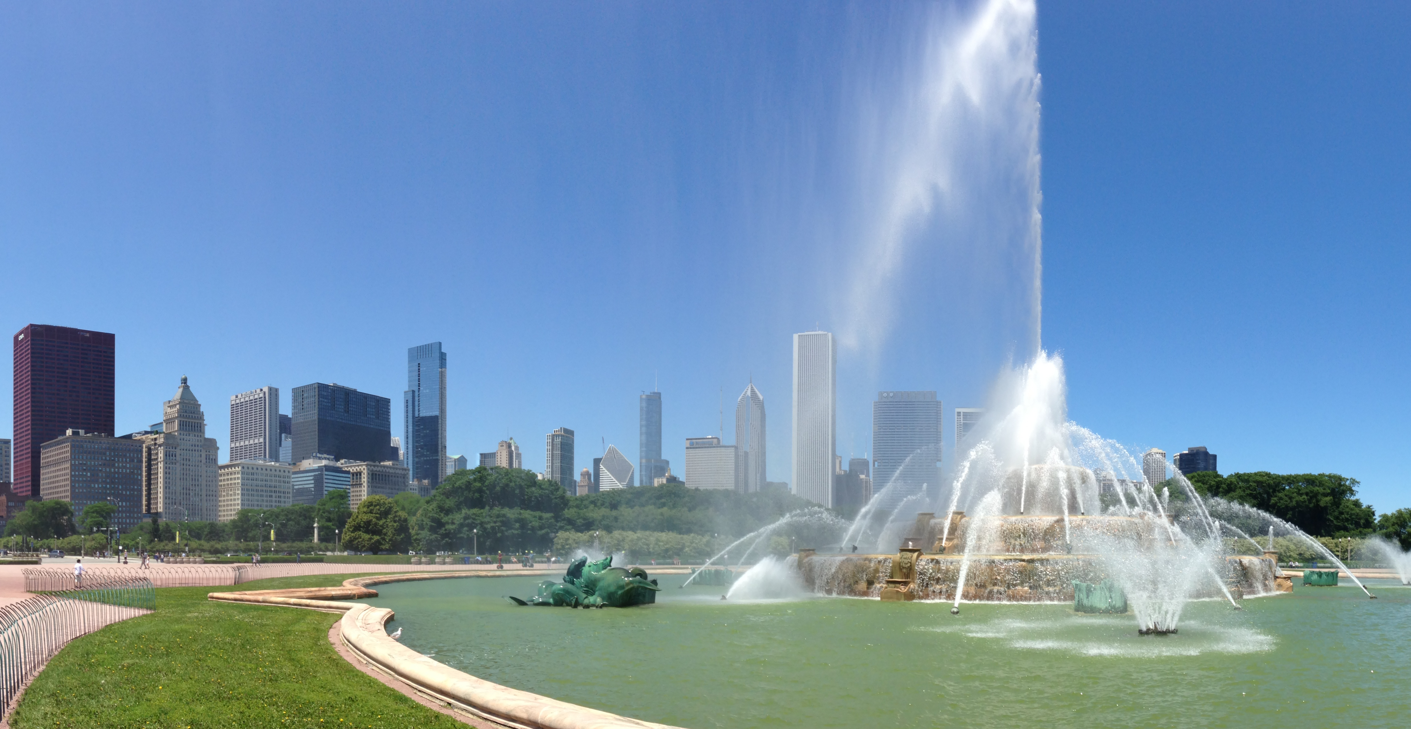 Buckingham Fountain